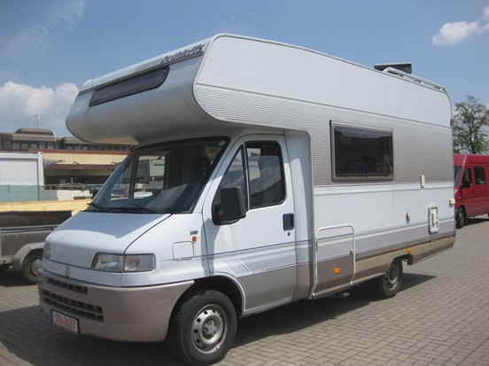 Wohnmobil der Firma Dethleffs auf Basisfahrzeug Typ Ducato